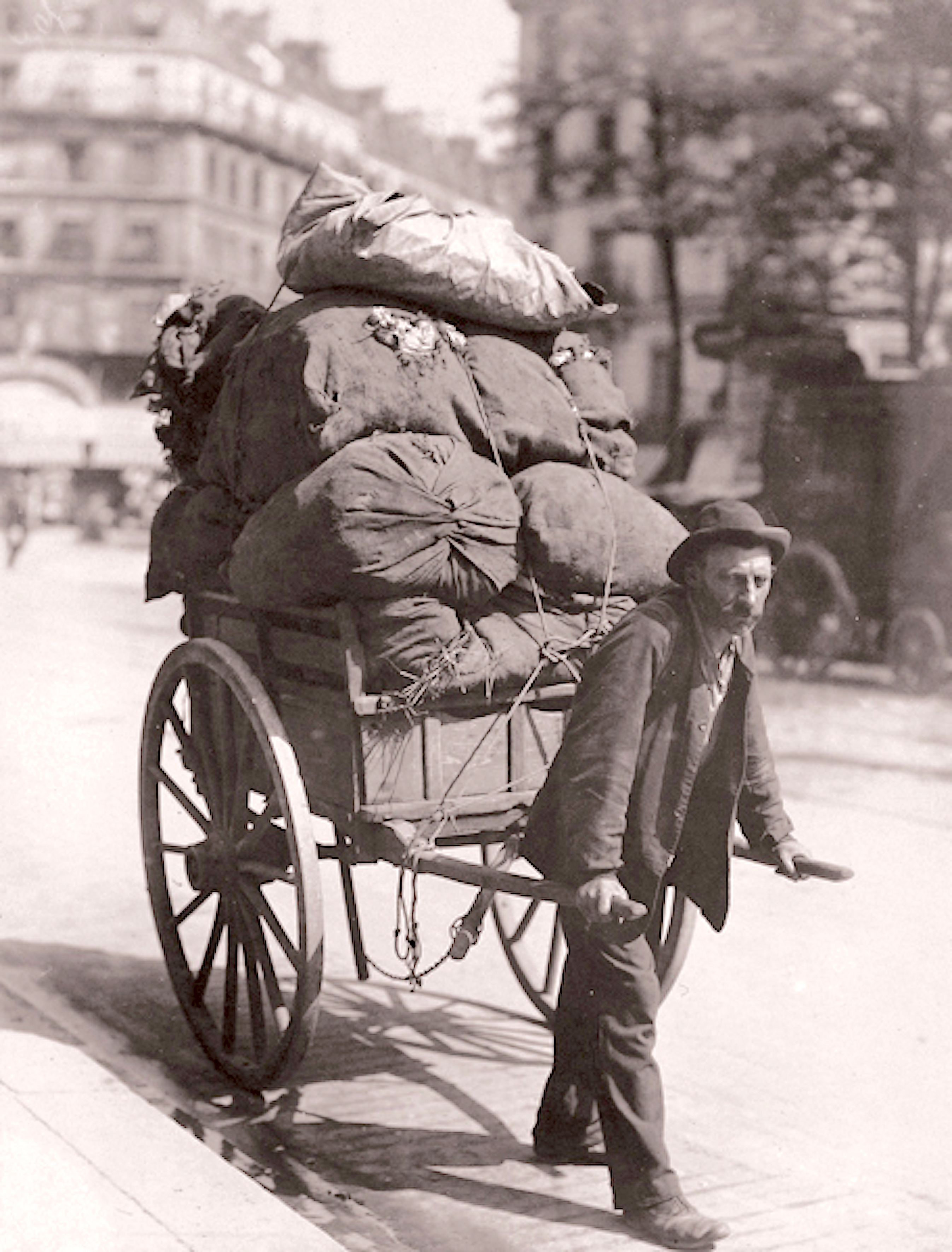 Ein Lumpensammler früh morgens in Paris, Avenue des Gobelins, Paris, 1899